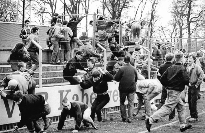 ADN-Pätzold-14.4.90- Schwerin: Leipziger Fans machten sich vor der FDGB-Pokal-Begegnung zwischen dem 1. FC Lok Leipzig und Dynamo Schwerin auf ihre Weise "warm". Die Welle der Gewalt auf den Fußballplätze und nach den Spielen ufert offenbar weiter aus.